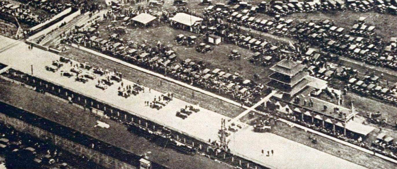 Départ de l'Indy 500 1923.